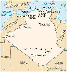 Alžeeria kaart